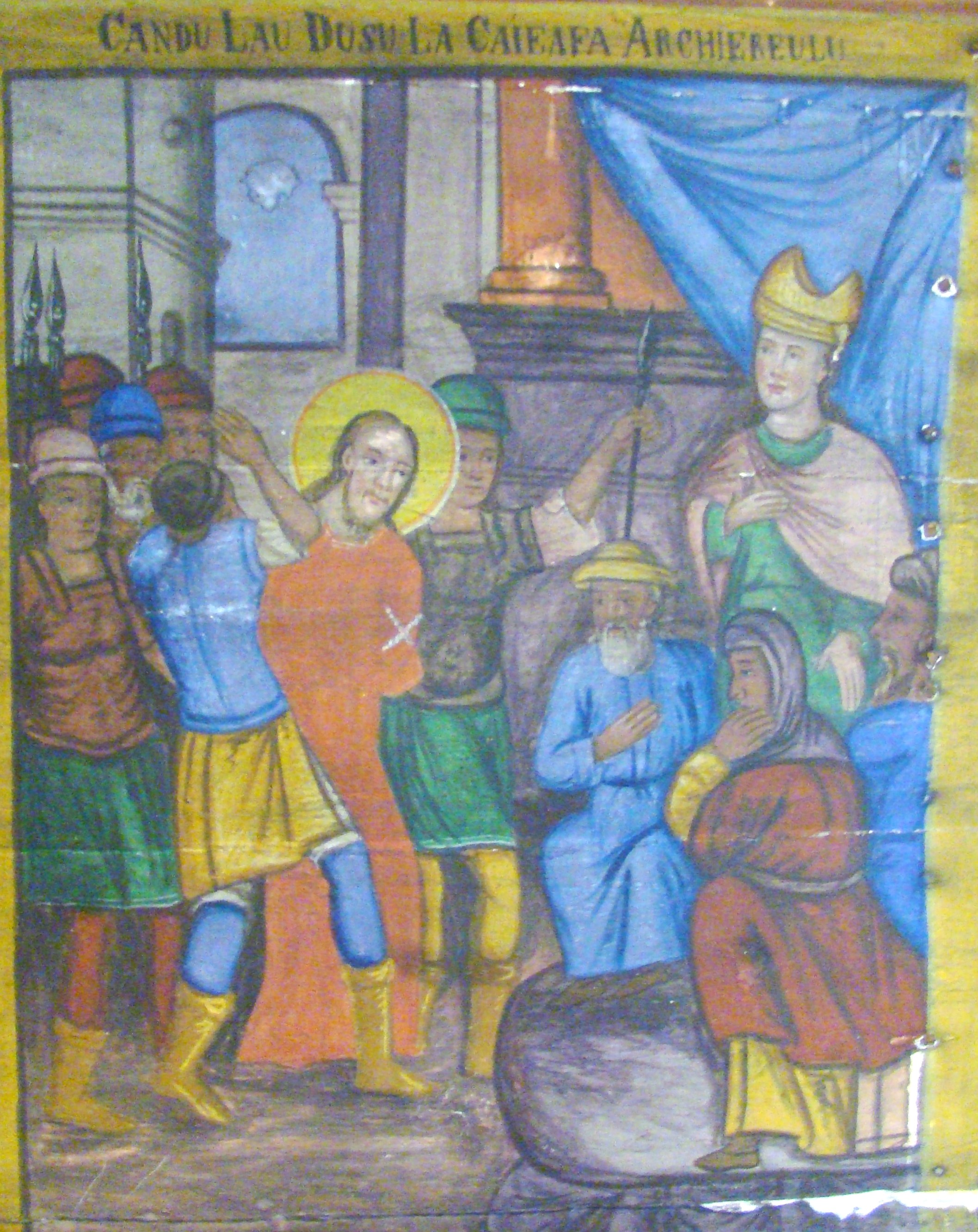 Biserica de lemn „Sfinții Arhangheli Mihail și Gavriil” din Țărmure, județul Arad